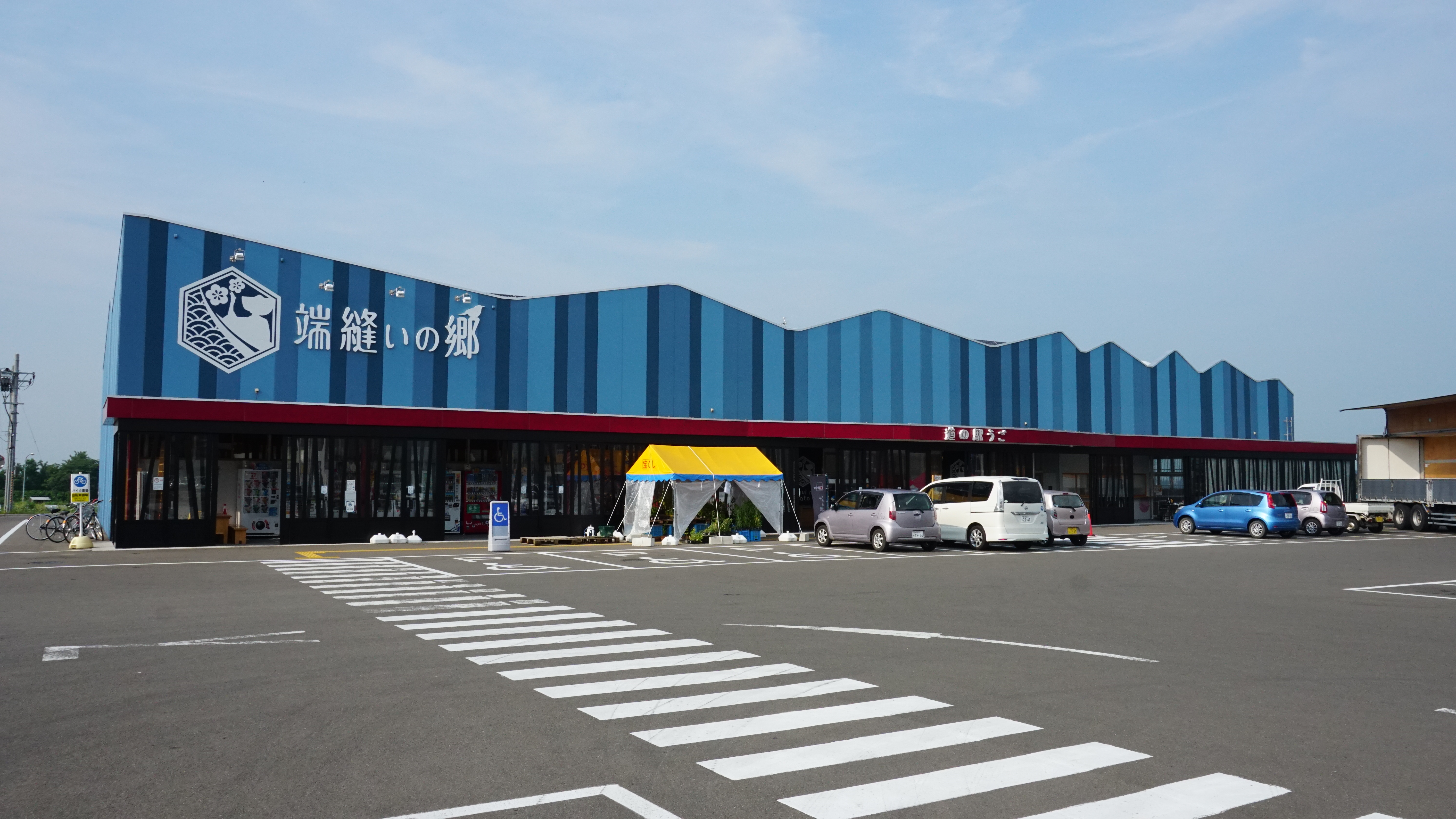 道の駅うご「端縫の里」